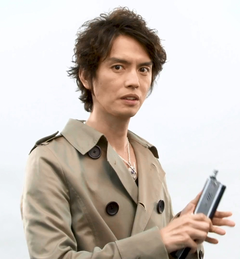 草加雅人役 村上幸平氏 が CSMカイザギアを触ってみた 2m18s